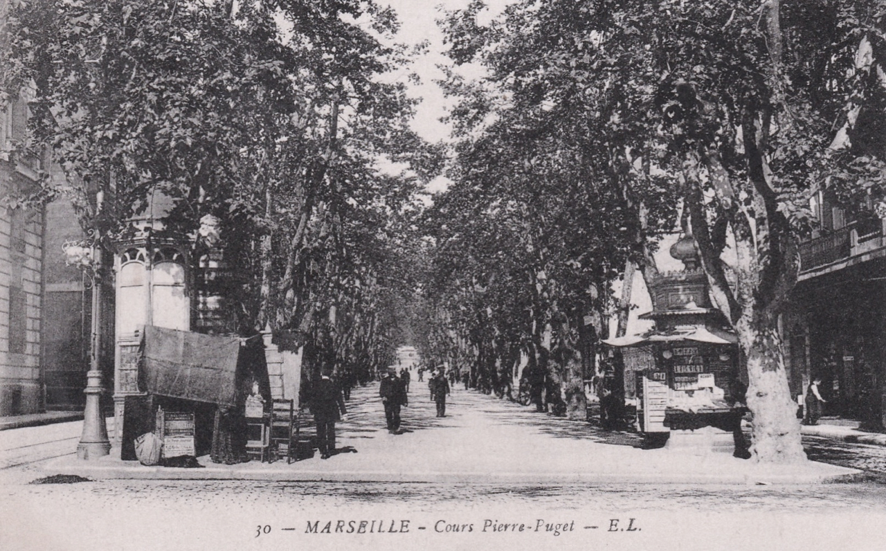 Le début du cours Pierre-Puget à Marseille. Carte postale ancienne, avant 1914.